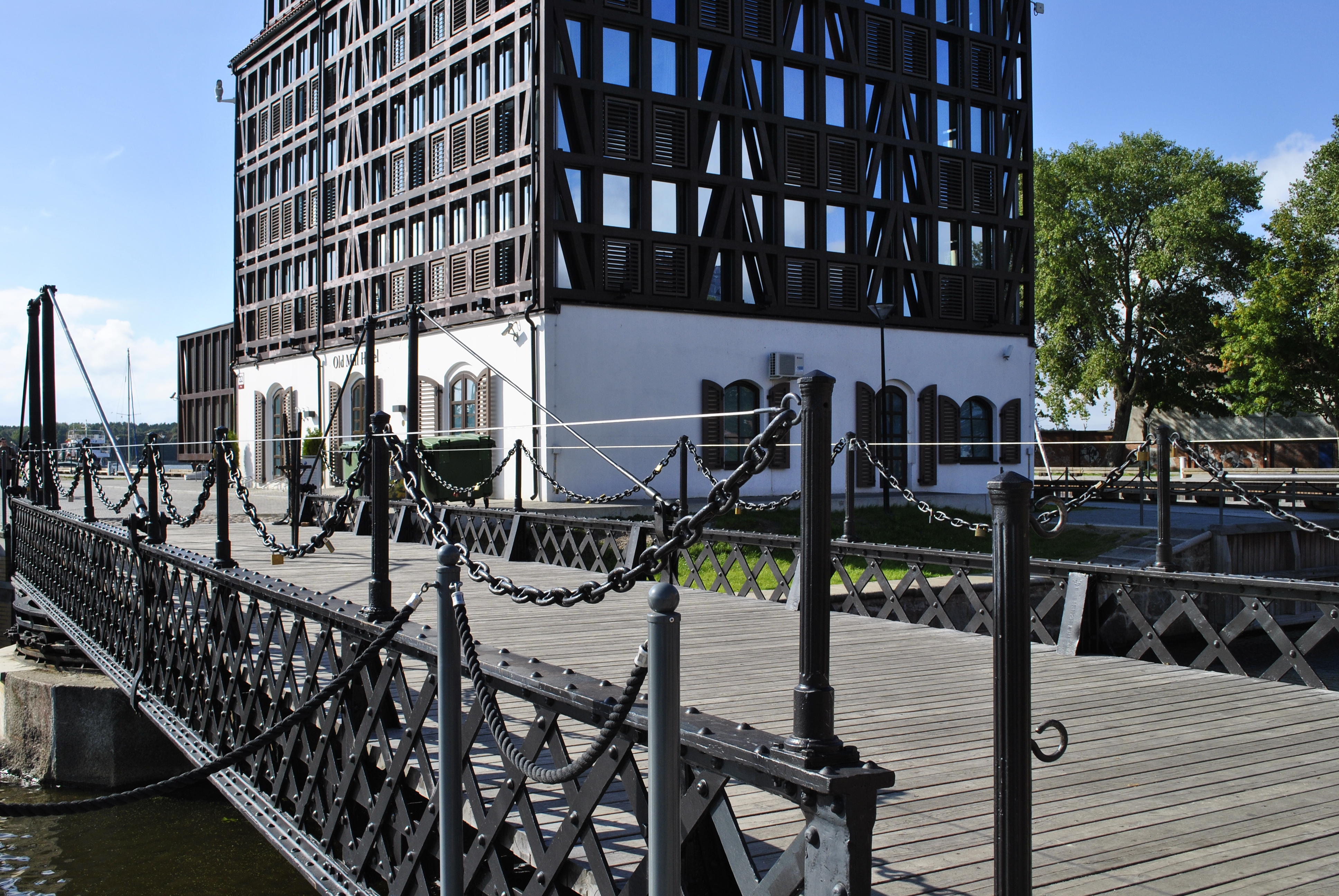 Pasukamas tiltelis jungiantis Klaipėdos pilies uostelį ir Danės (Dangės) upę.